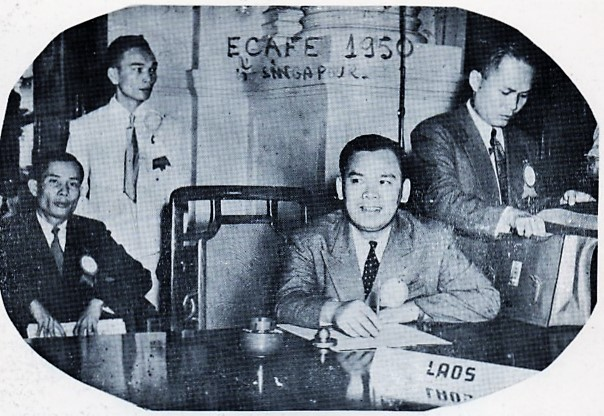 Kou Voravong à la conférence de ECAFE (United Nations Economic Commission for Asia and the Far East) en 1950, dans sa fonction de ministre de l'Économie.